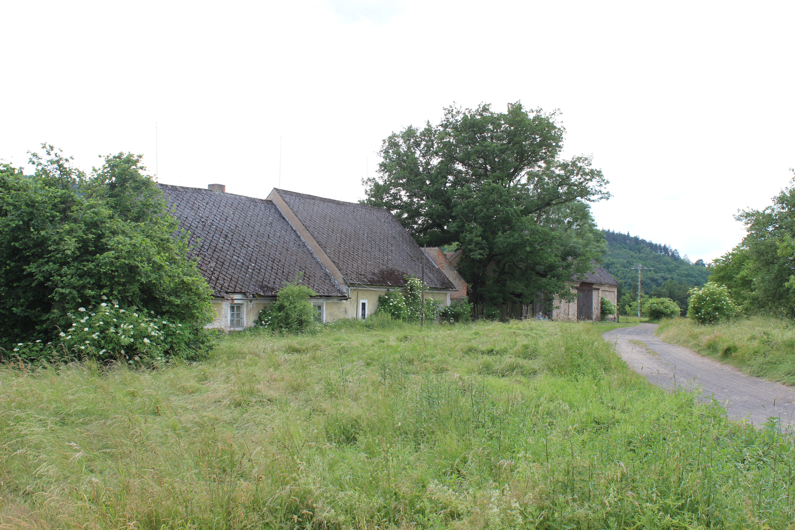 Dům číslo popisné 1 v Častononicích u Křivoklátu.